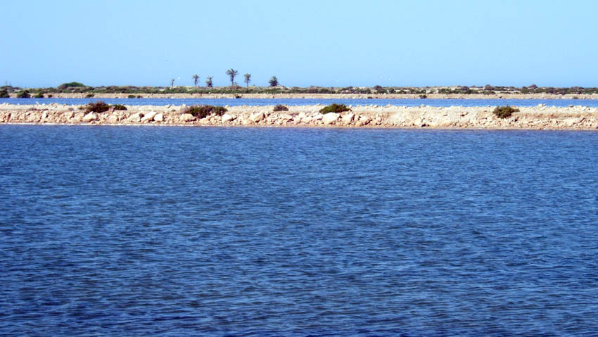 Playa de la Barraca Quemada - San Pedro del Pinatar